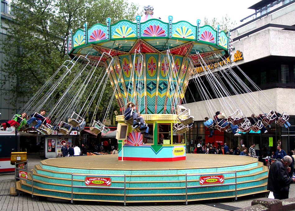 Kettenkarusell auf einem Fest in Wuppertal